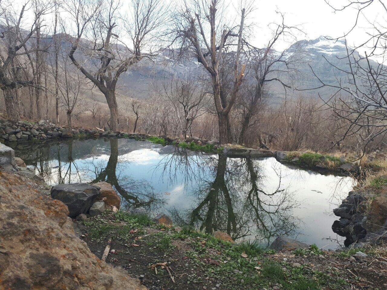 بولاق گولو